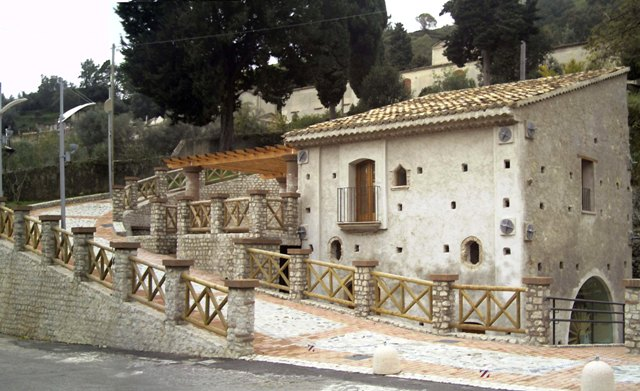 Autore: Gino Larosa OTRS: 2008021510007787